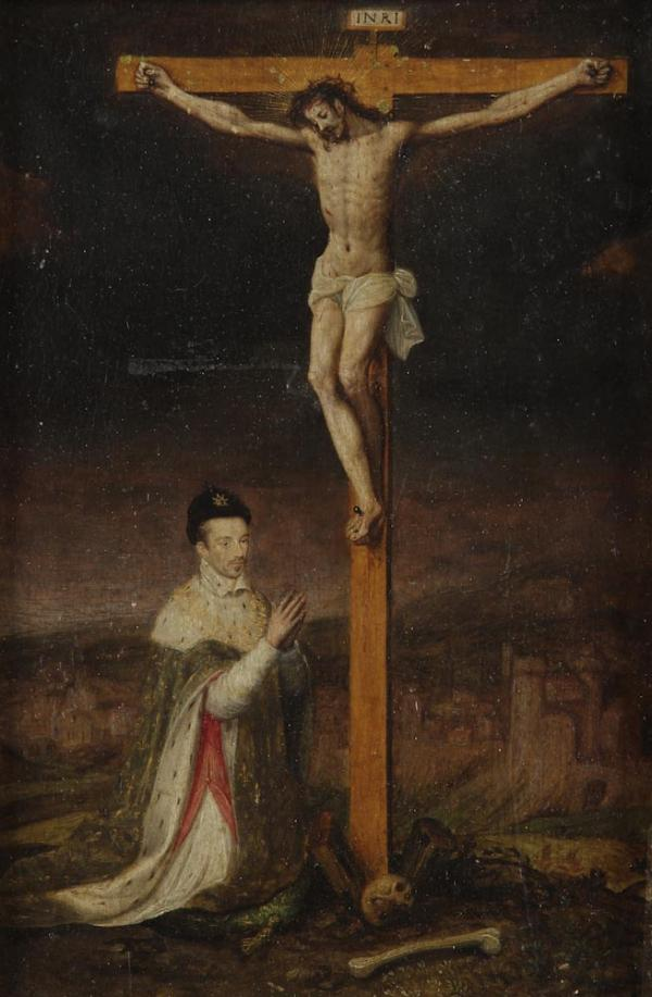 Portrait représentant Henri III en prière, agenouillé sur un coussin, « sans doute aux fins de propagande dans le contexte des guerres de religion » selon Élisabeth Latrémolière, conservateur en chef du château de Blois. Le roi arbore une toque noire avec boucle d'or ainsi qu'une robe rouge et « le manteau en velours vert des chevaliers du Saint-Esprit dont il porte le collier » (Lafenestre et Richtenberger, Le Musée national du Louvre, 1907). Le Christ en croix figure au centre de la toile. On devine un village à l'arrière-plan.